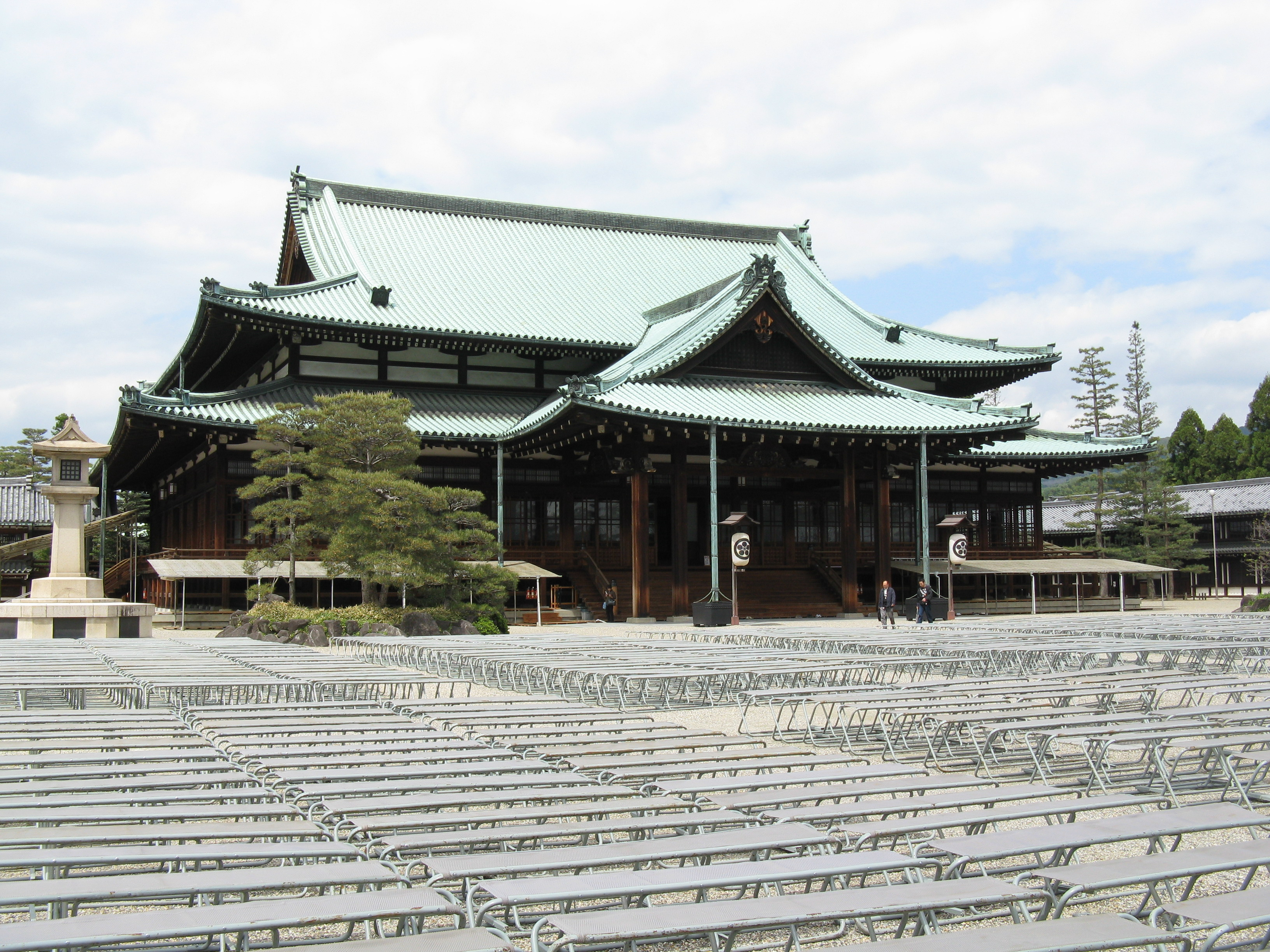 天理教教会本部 教祖殿